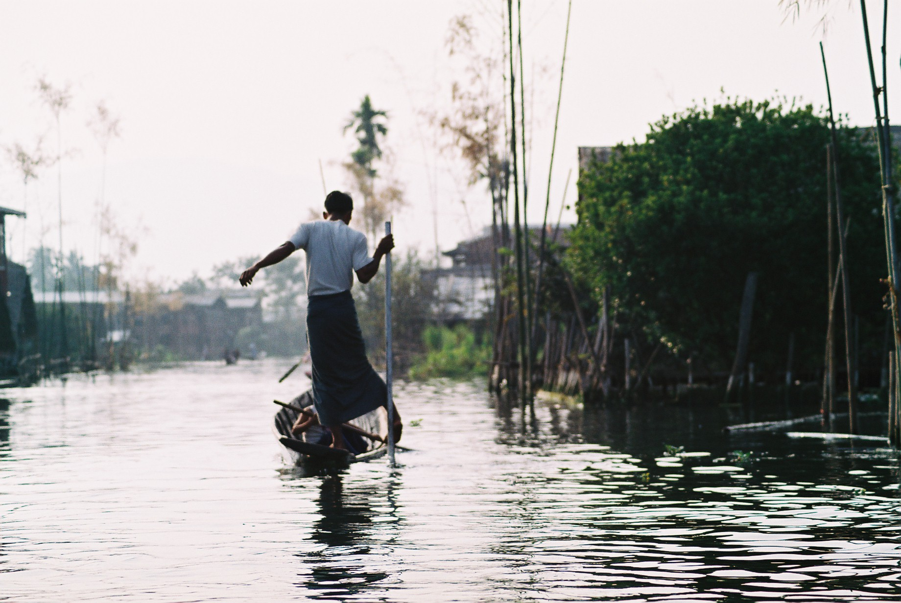 Inle aintzira